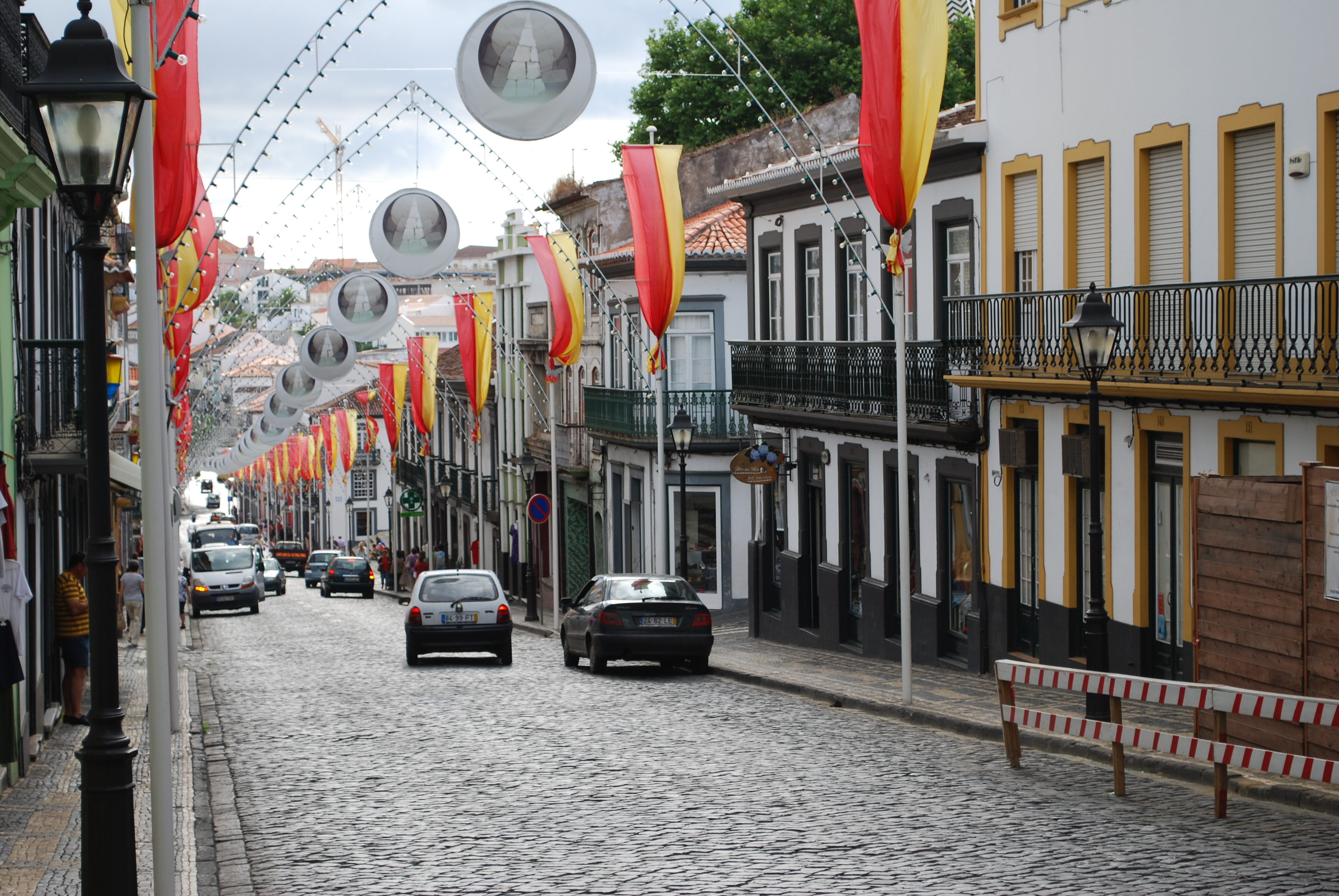 Rua principal da zona central da Cidade de Angra.